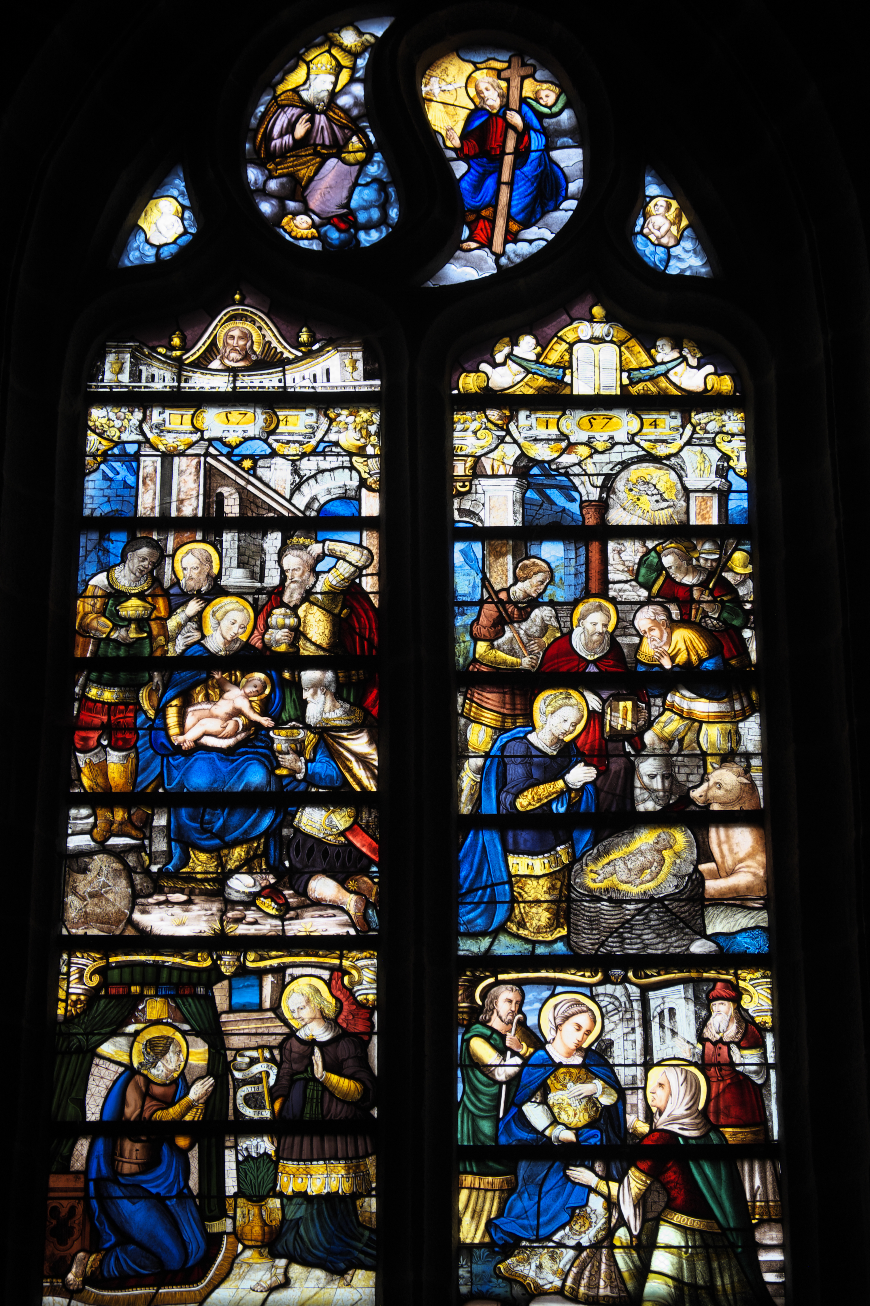 Katholische Pfarrkirche Saint-Pierre-Saint-Paul in Bazouges-la-Pérouse im Département Ille-et-Vilaine (Region Bretagne/Frankreich), Marienfenster (baie 14) von 1574